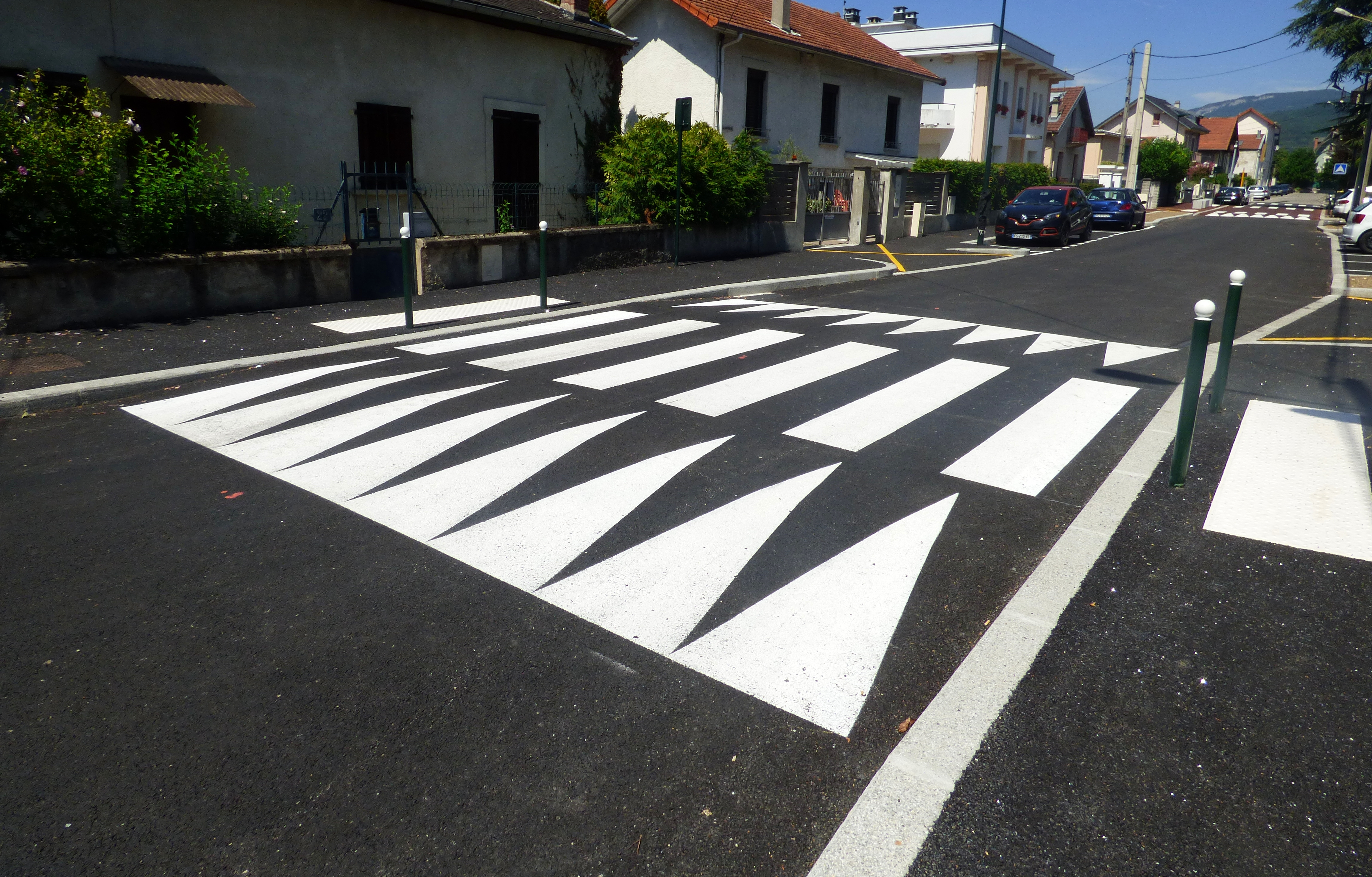 Un ralentisseur de type dos-d'âne, accompagné d'un passage pour piétons sur Aix-les-Bains (73).